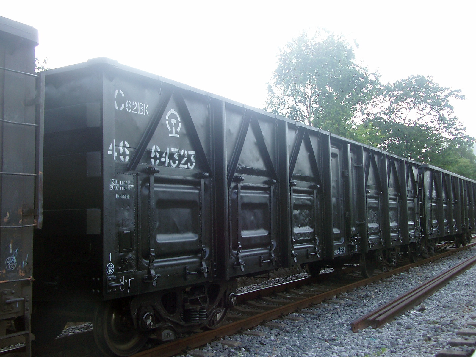 苏联制造的C62BK型敞车